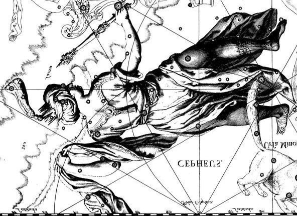 Cepheus constellation